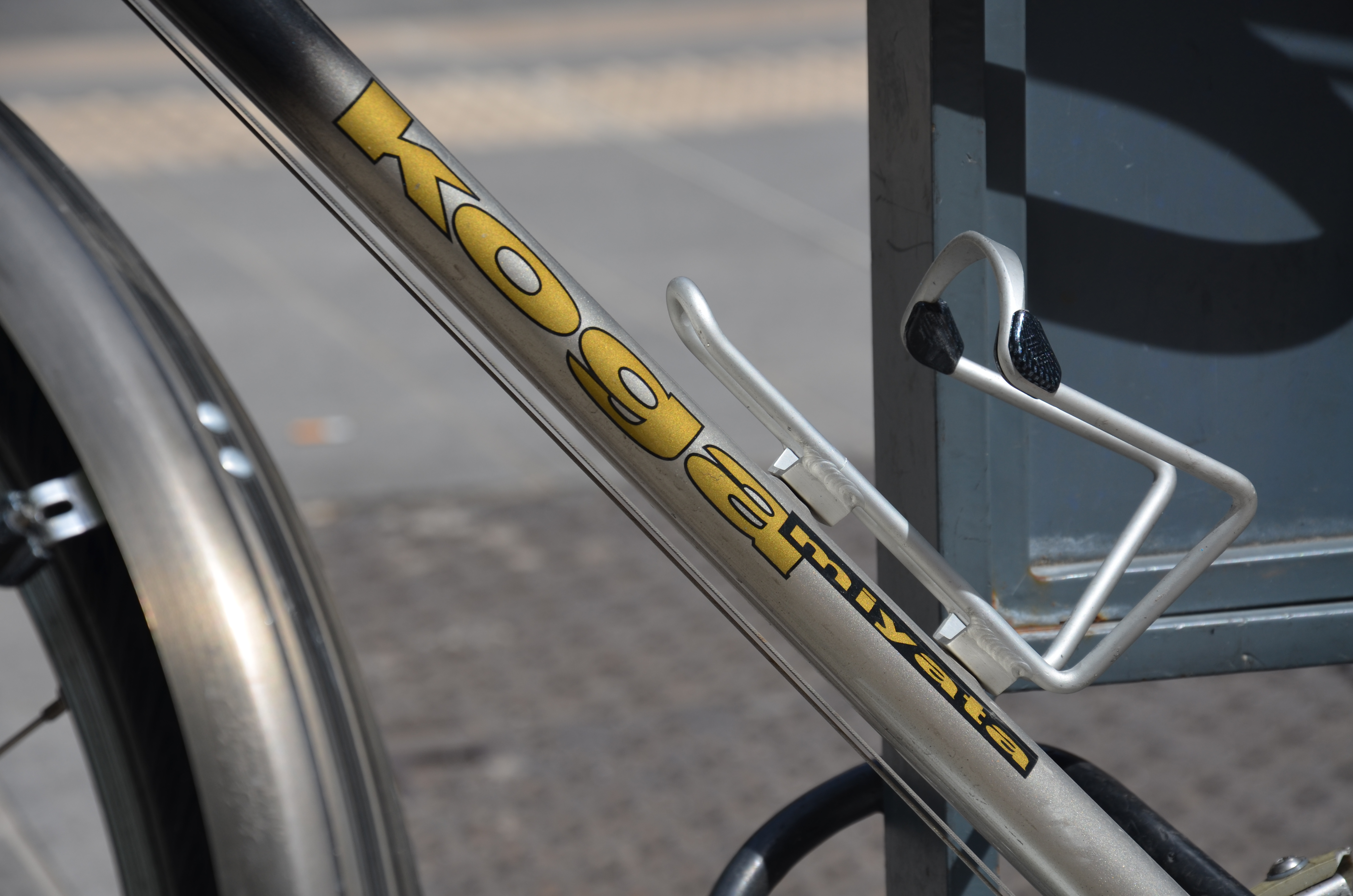 Koga Miyata bicycle brand